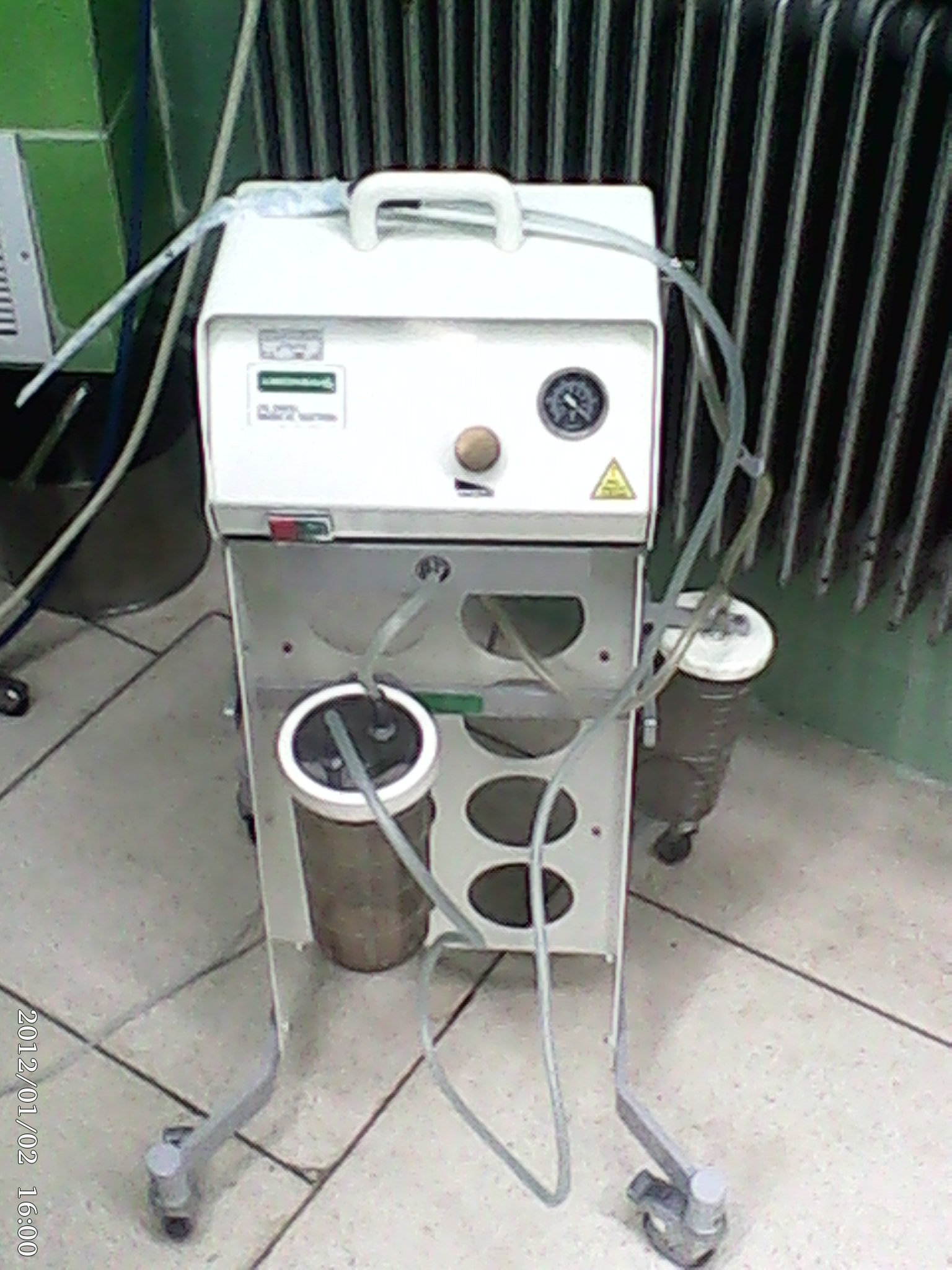 دستگاه ساکشن پرتابل